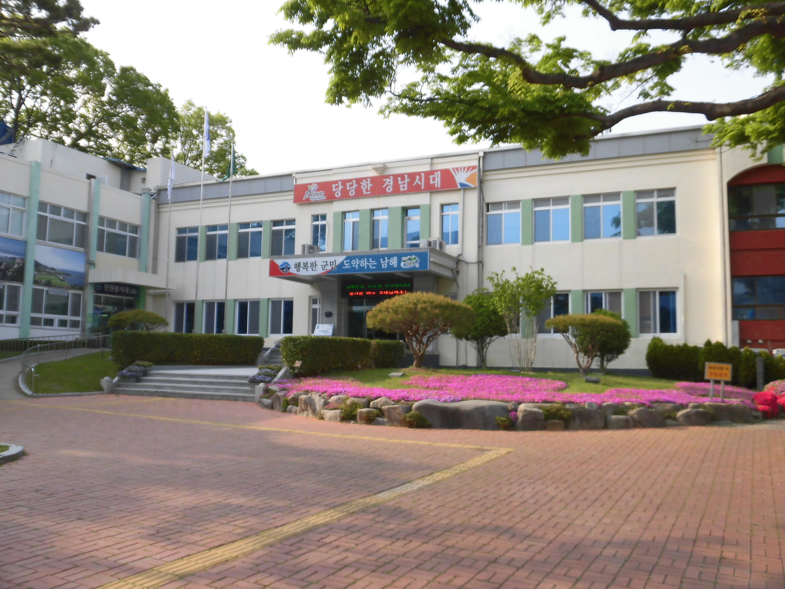 경상남도 남해군에 있는 남해군청